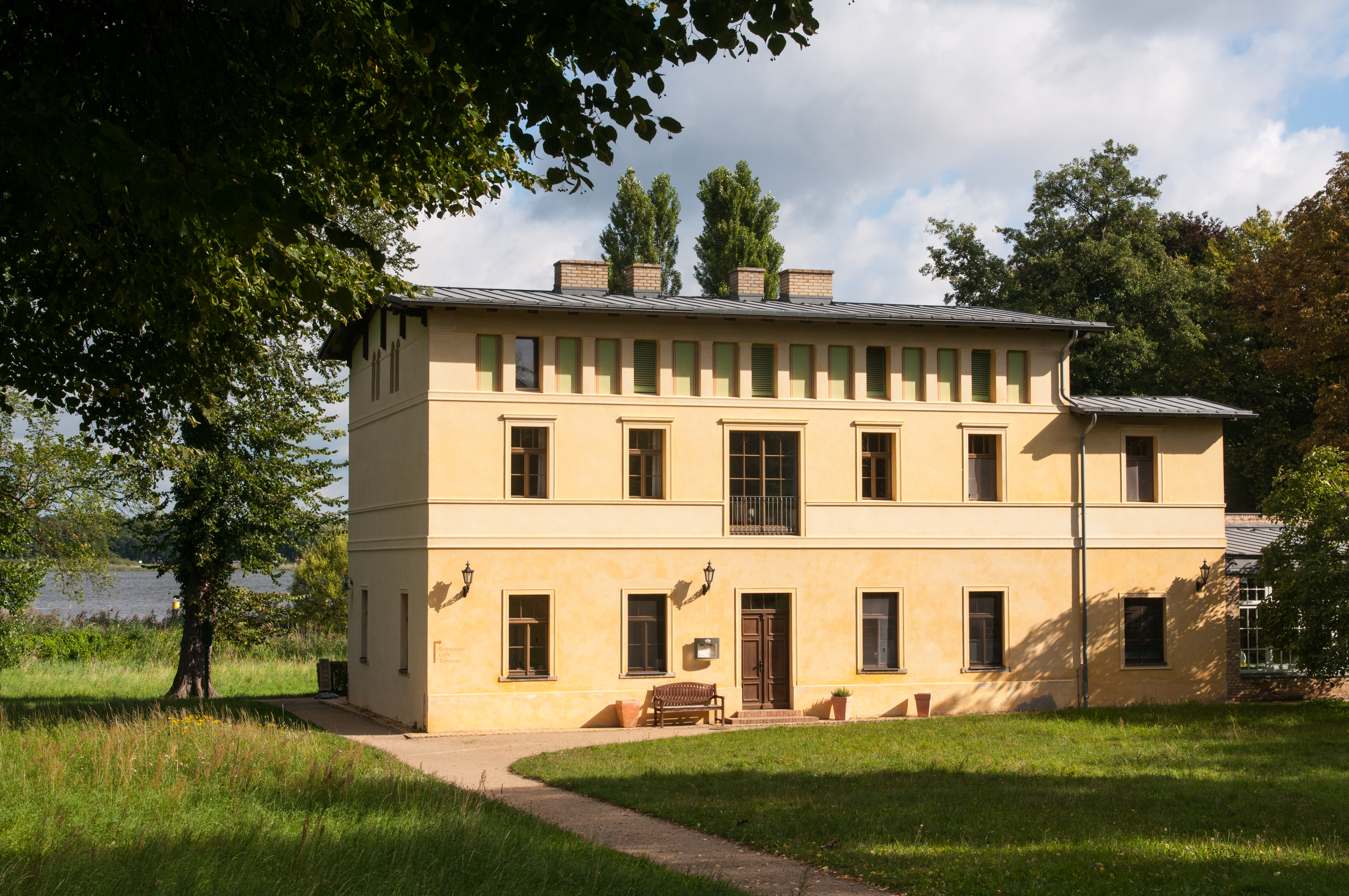 Kavalierhaus, Schloß Caputh